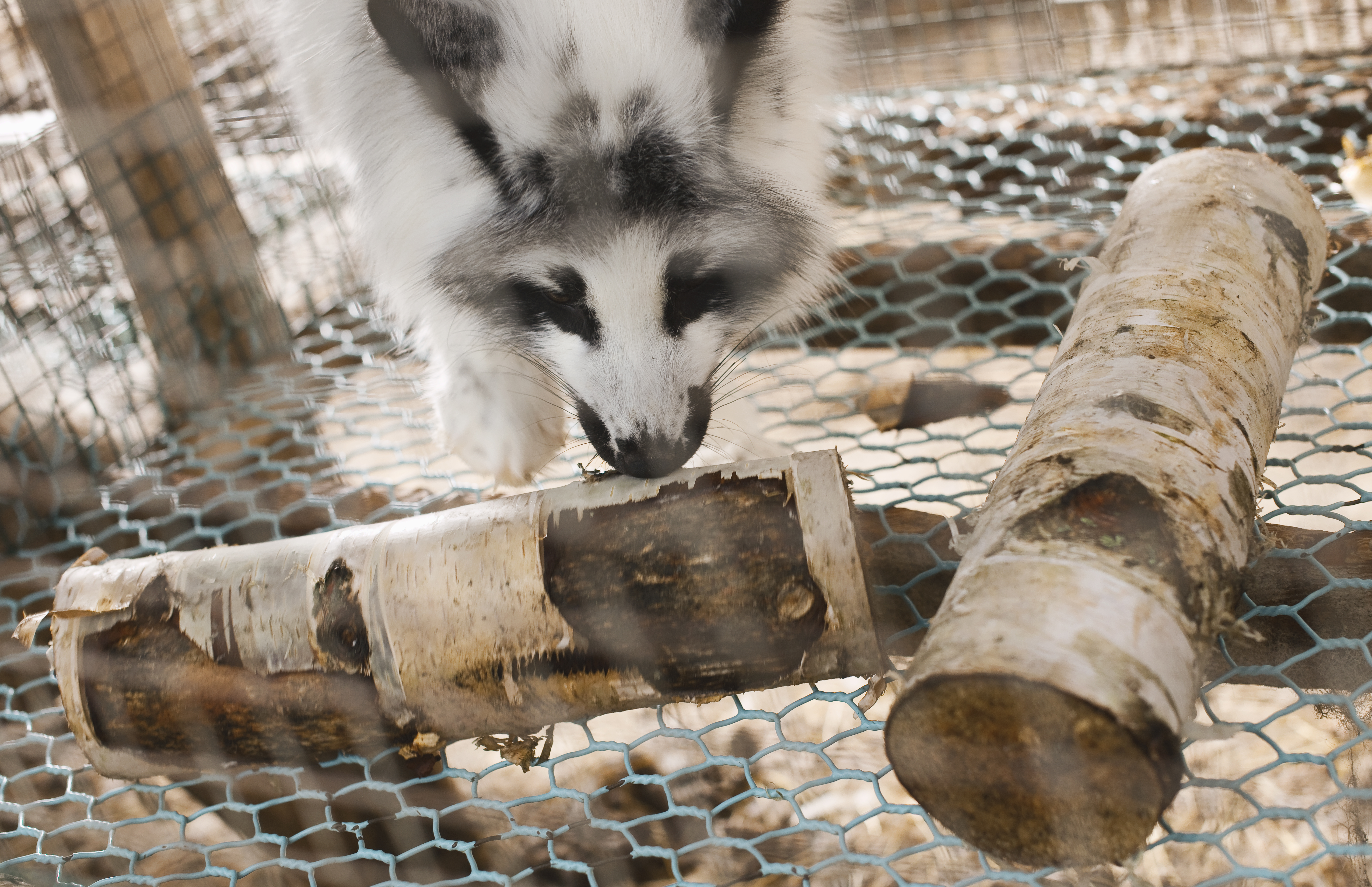 Bestämmelser gällande djurhälsa är strikta för finländsk pälsdjursuppfödning. Rävar ska till sitt förfogande ha stimulansmaterial.